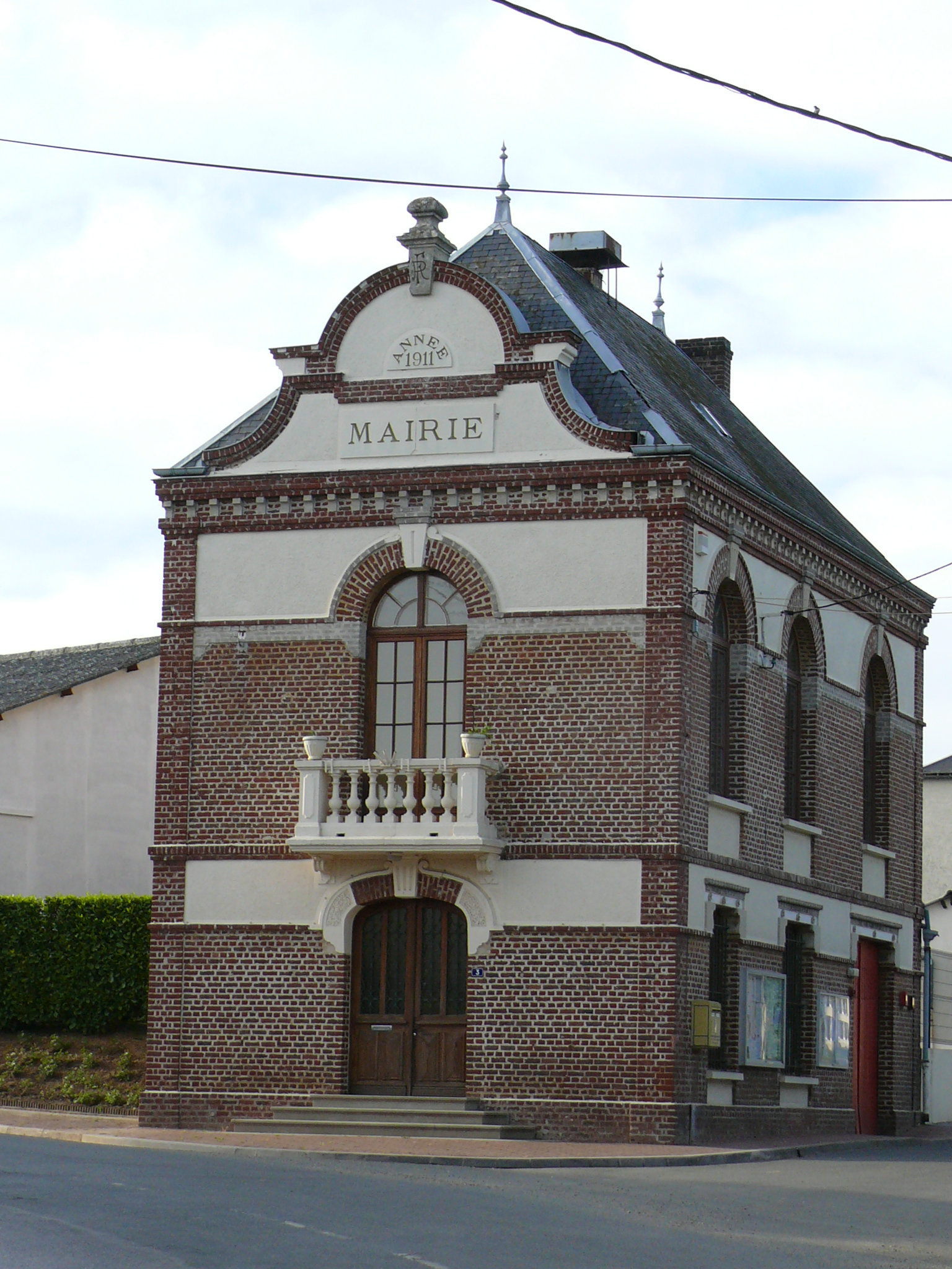 Sommereux (Oise - Picardie - France) : La mairie